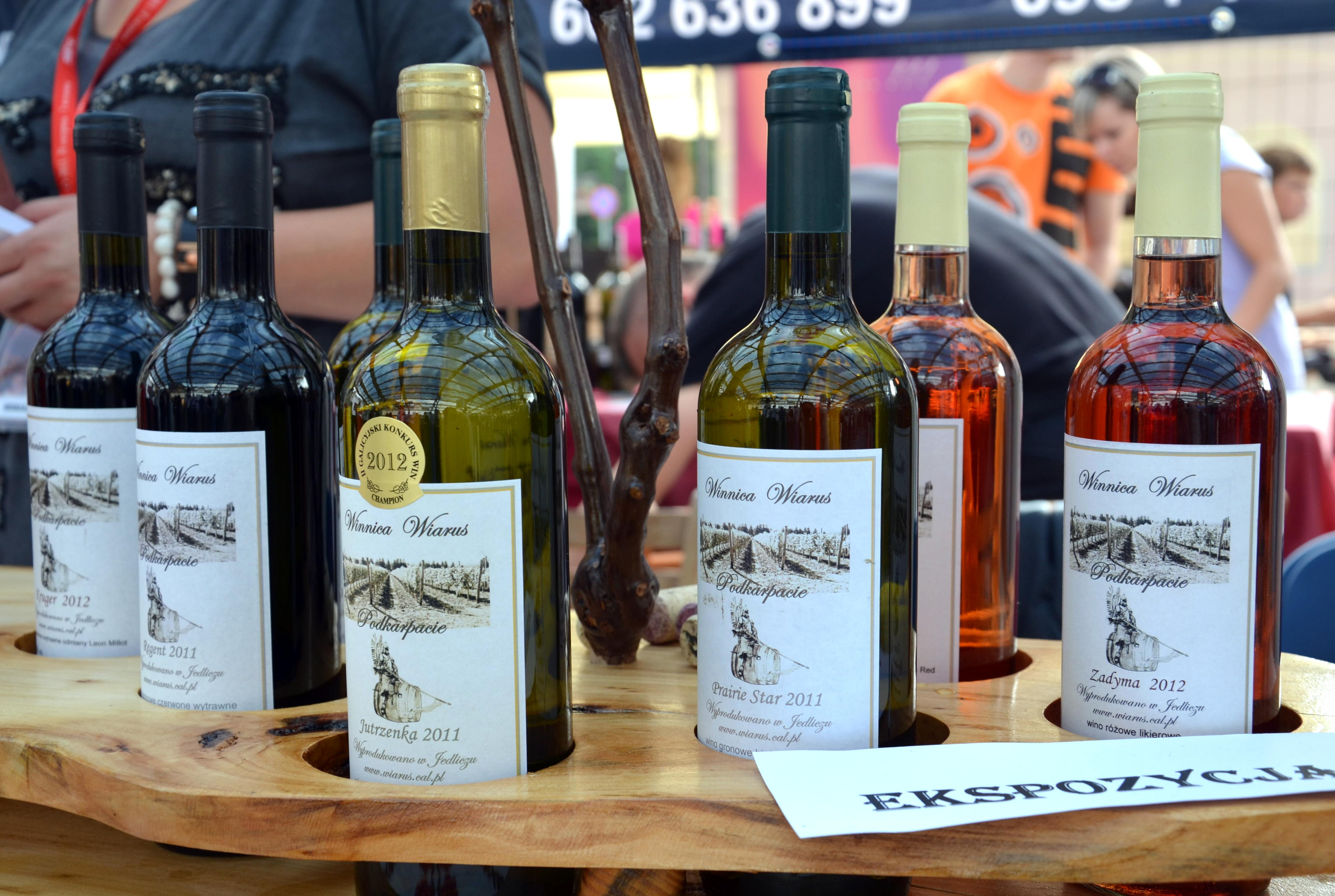 verschiedener Weine aus Sud-Polen